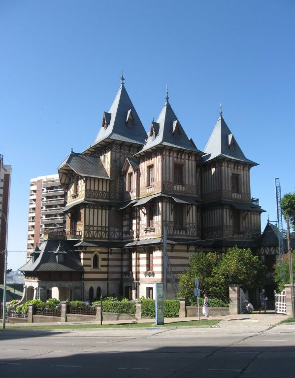 El Museo Municipal de Arte Juan Carlos Castagnino (la antigua Villa Ortiz Basualdo) en Mar del Plata, Argentina.